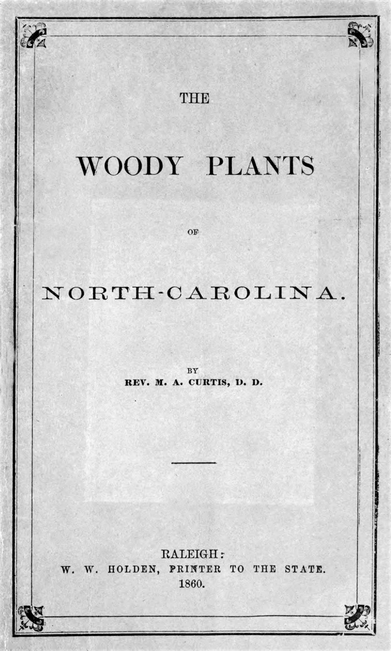 Moses Ashley Curtis: "The Woody Plants of North-Carolina", 1860